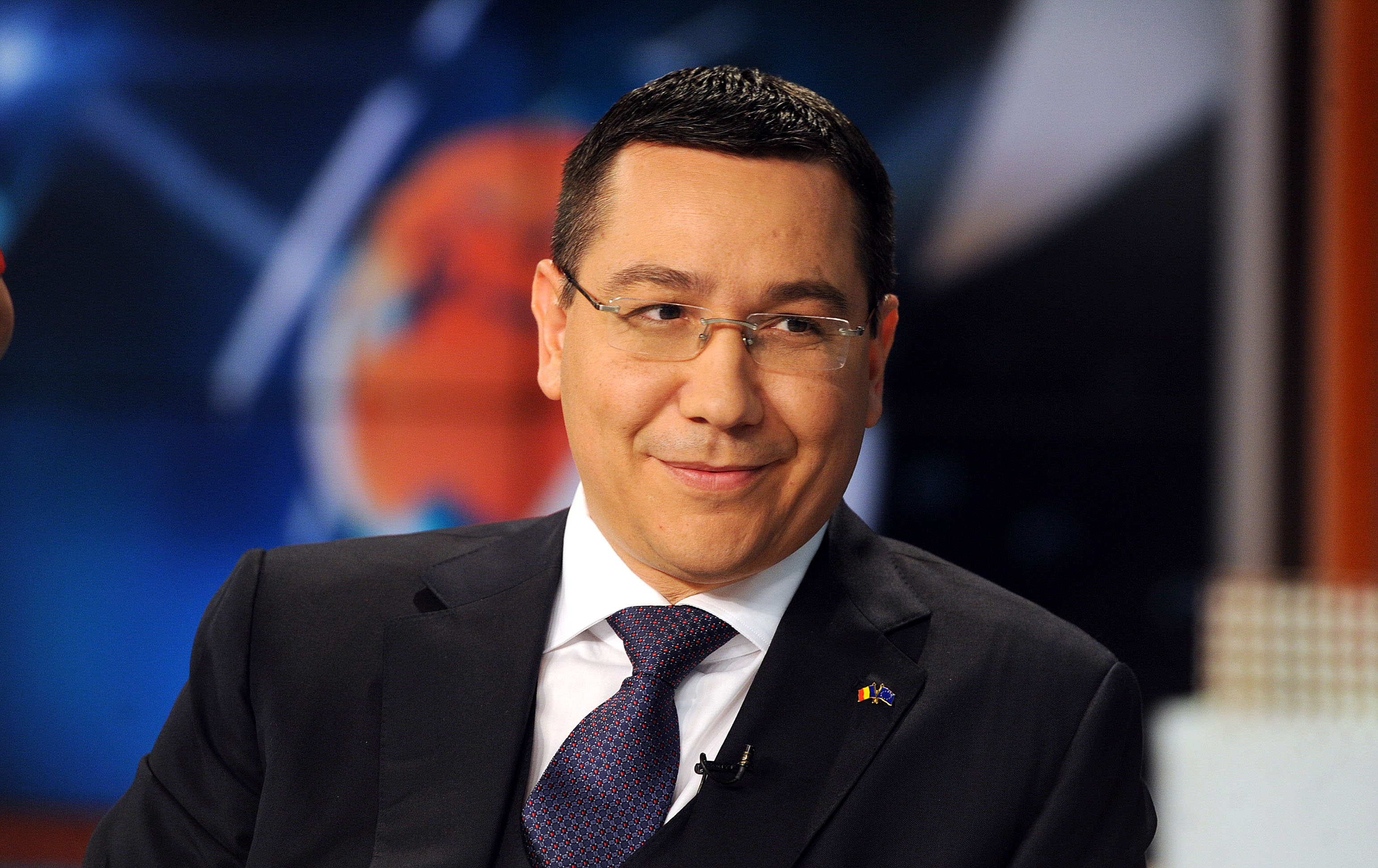 dezbatere (1)